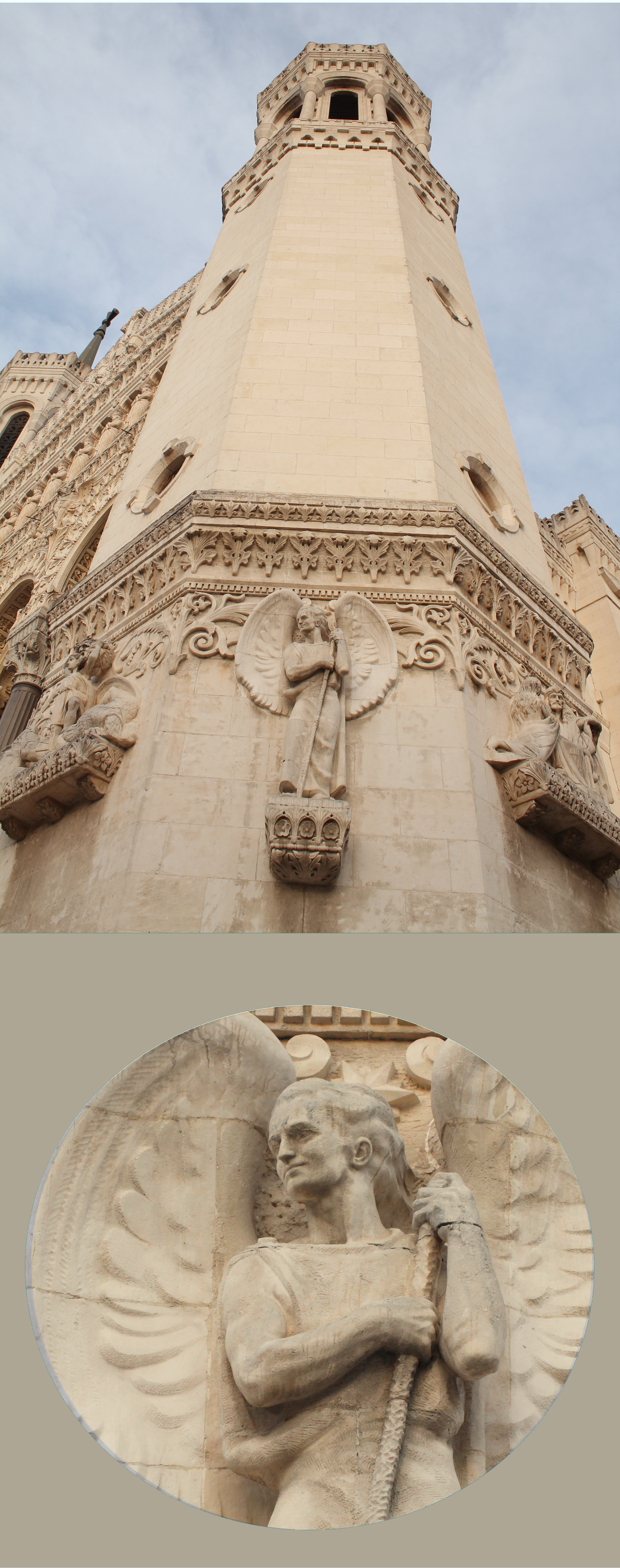 Tour de la Justice de la Basilique de Fourvière, et gros plan sur l'Archange Gabriel, sculpté par Robert Darnas, au soleil couchant 03/11 vers 17h